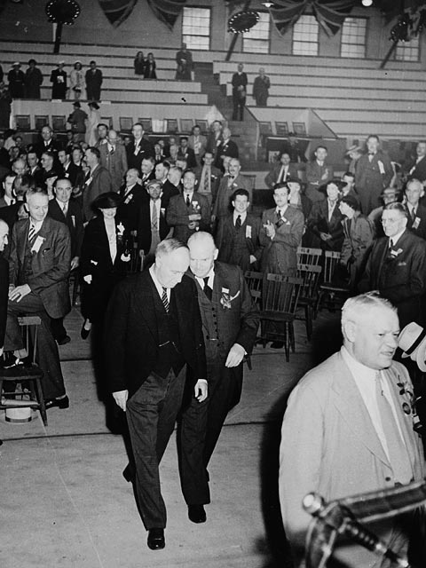 Hon. R.B. Bennett and Senator Arthur Meighen